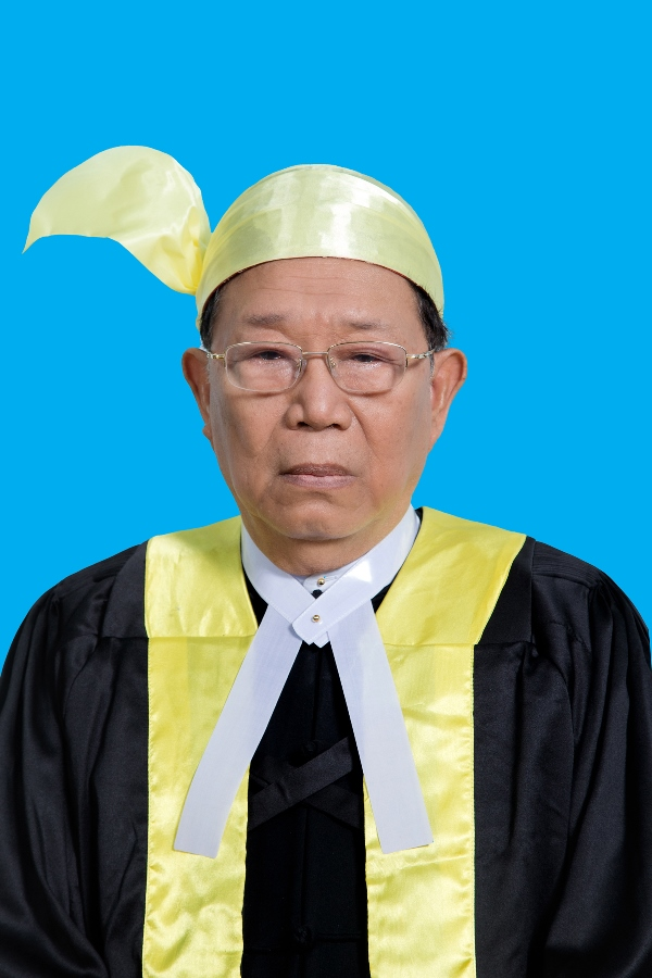 မြန်မာဘာသာ: U Myo Nyunt